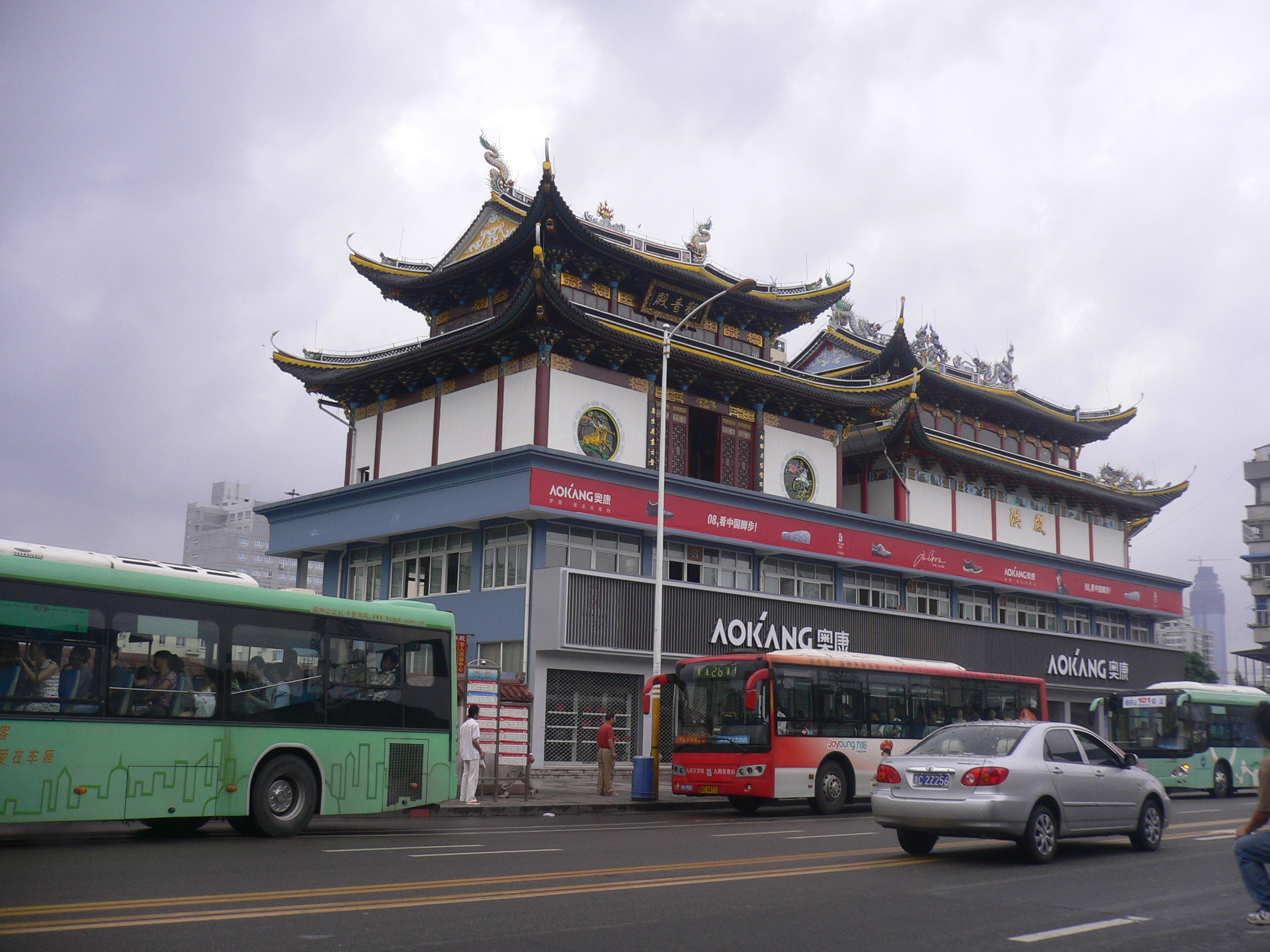 新洪殿 Xīn hóng diàn, "New hung temple".